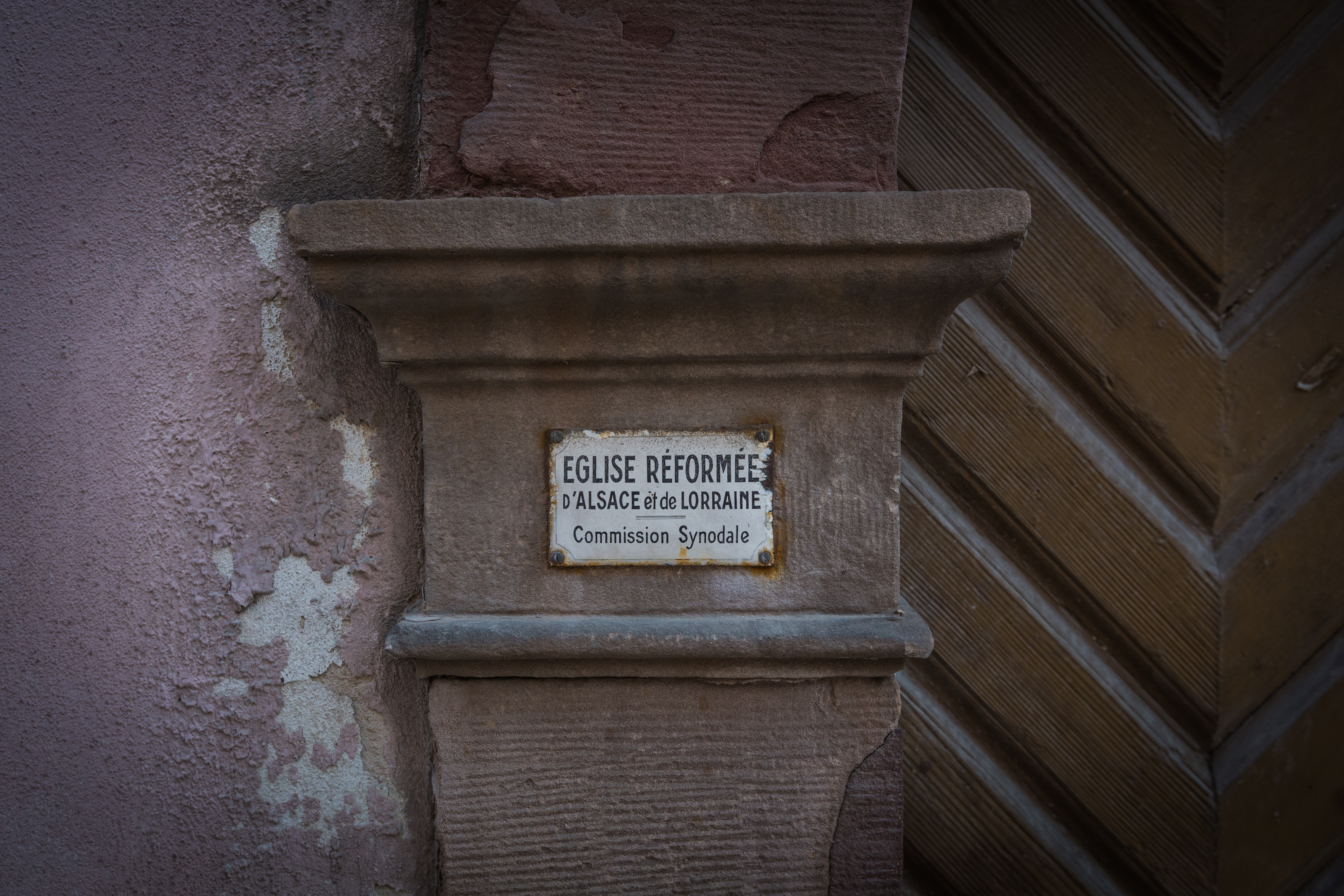 Plaque émaillée de l’Église réformée d’Alsace et de Lorraine apposée sur un immeuble de la Rue du Bouclier à Strasbourg